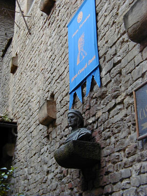 義大利佛羅倫斯，但丁之家外的但丁雕像。但丁是義大利佛羅倫斯出身的詩人與政論家，他當年在佛羅倫斯的故居，已經成為一座專門紀念他的博物館。圖中所見是但丁博物館外的但丁雕像。本圖片由上傳者SElephant拍攝於2000年12月。